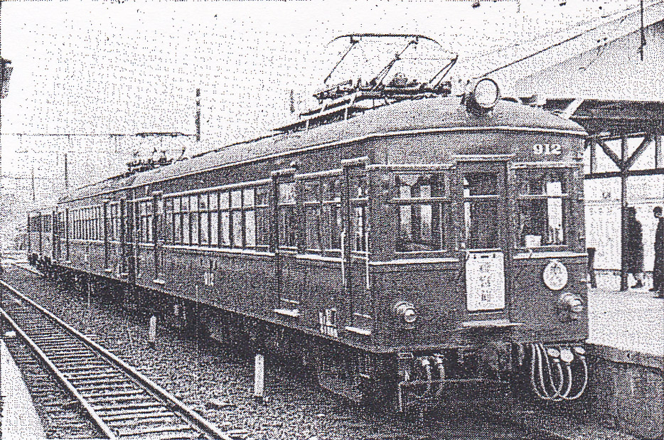 名鉄モ910形912（1両目）、モ911（2両目）。旧・知多鉄道がデハ910形として1931年導入。須ヶ口駅にて撮影。